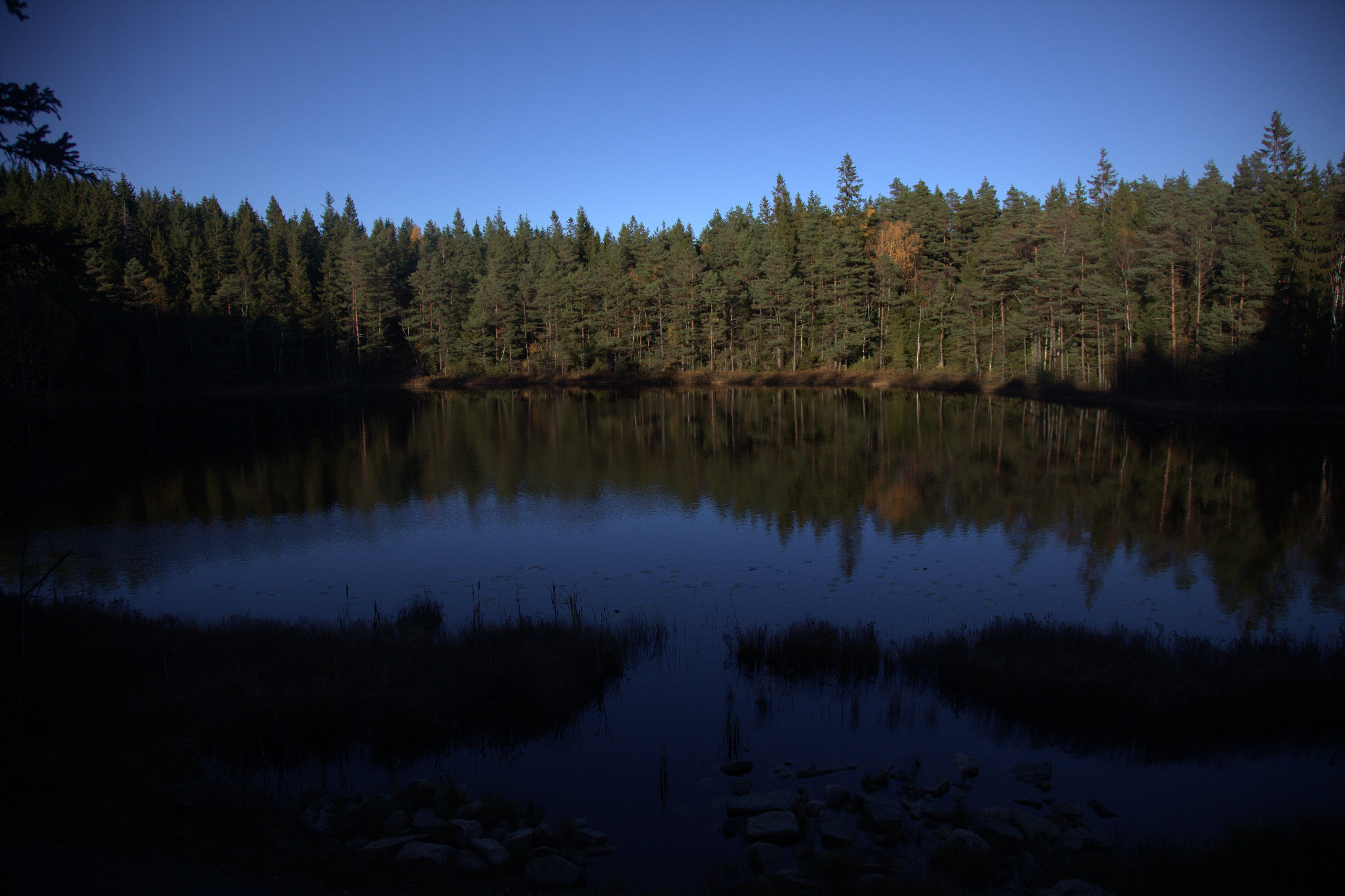 Nornäbban i Kungälvs kommun